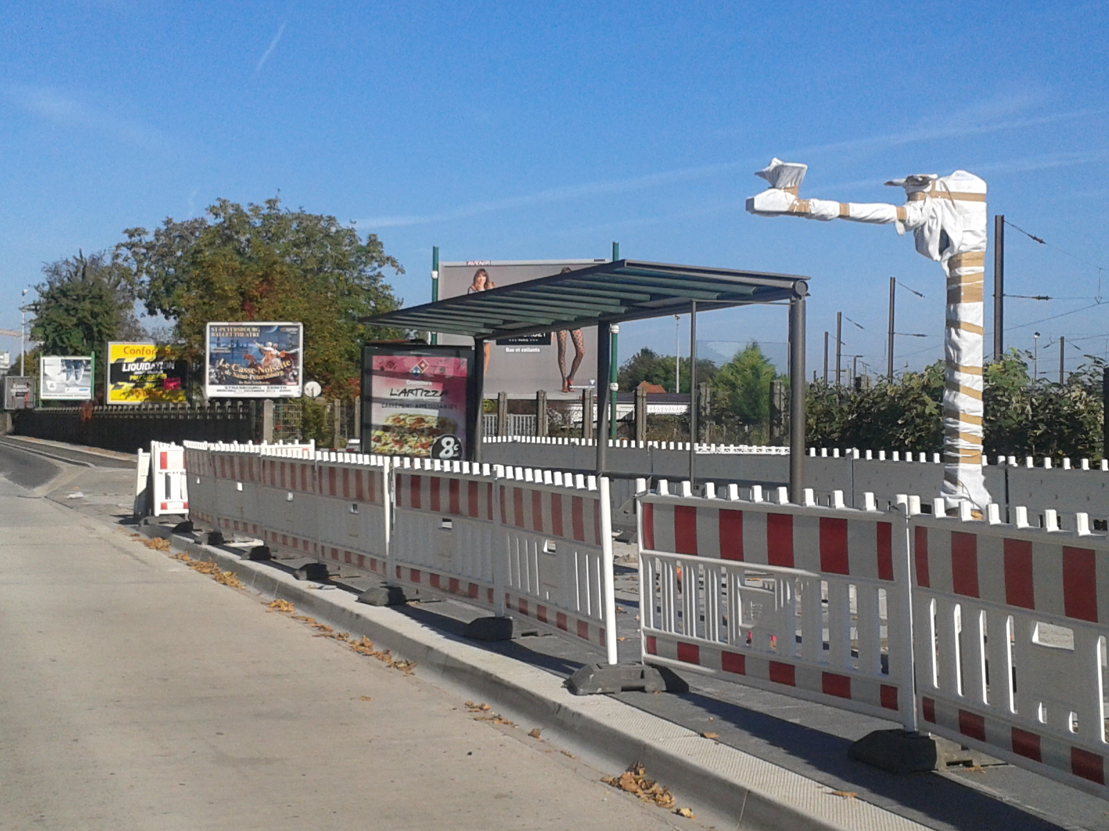 La future station "Hochfelden" de la ligne G du BHNS de Strasbourg, en direction de l'Espace Européen de l'Entreprise (E3), le 19 octobre 2013.